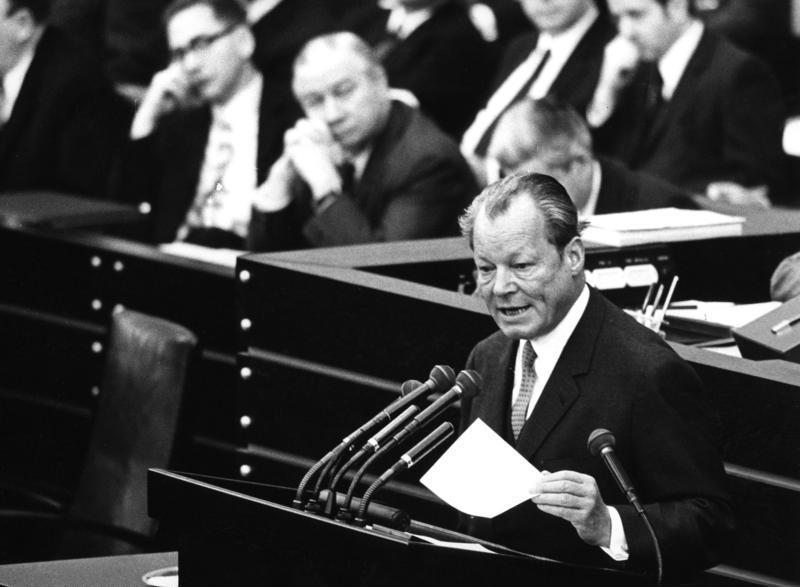 28. Januar 1971 Bundeskanzler Willy Brandt: Bericht zur Lage der Nation im Bundestag